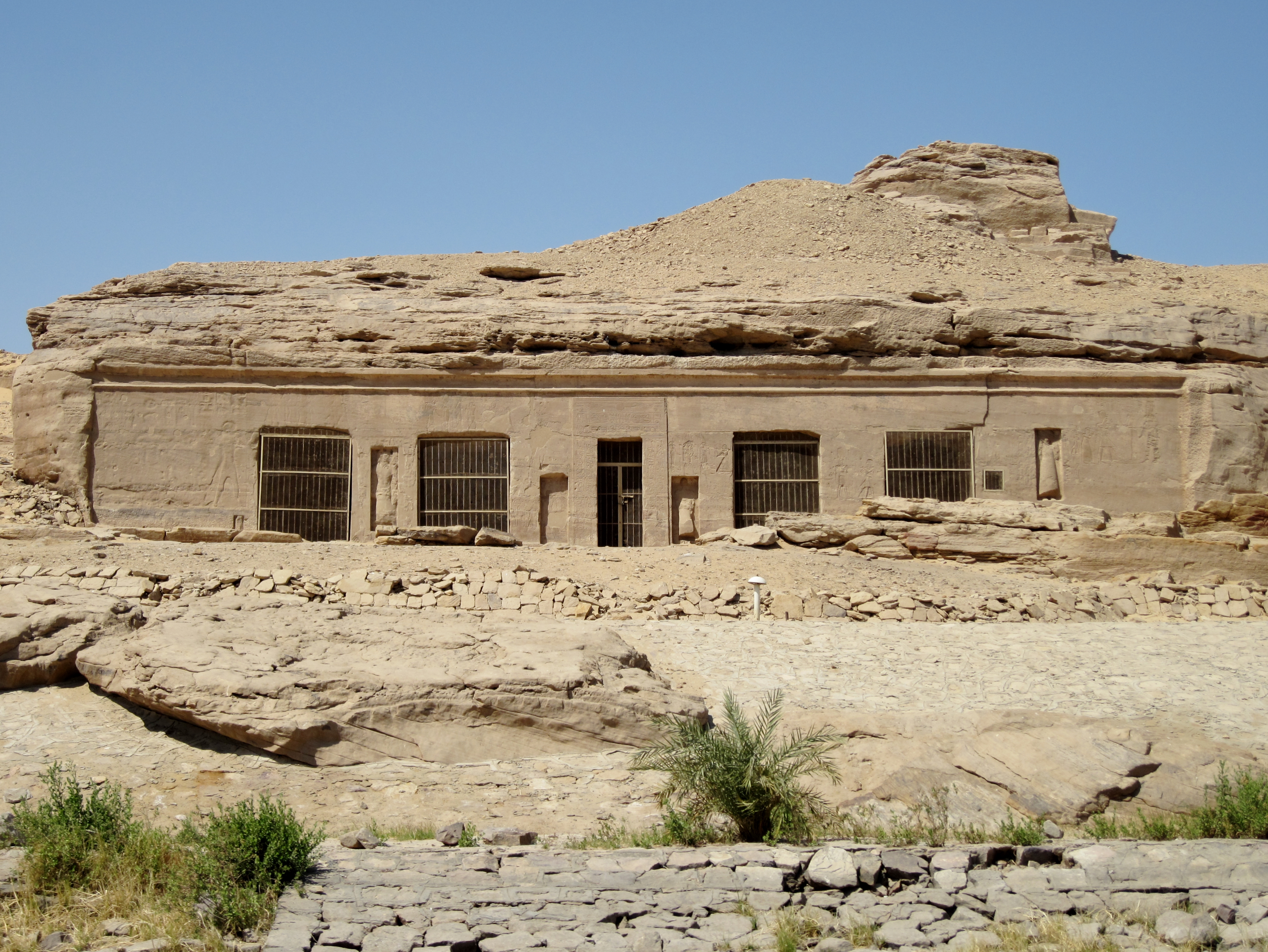 Felsentempel des Haremhab im Steinbruch Dschabal as-Silsila an der Westseite des Nil nördlich von Kom Ombo, Ägypten